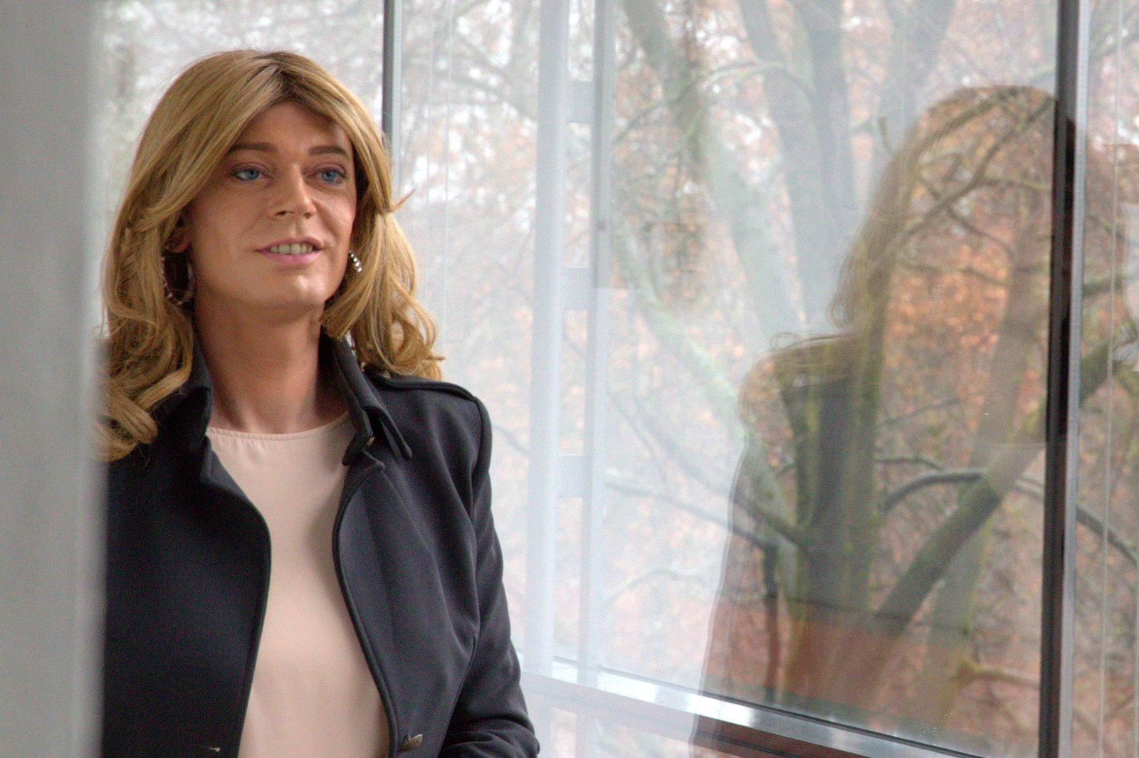 Tessa Ganserer (bis Ende 2018: Markus Ganserer), deutsche Politikerin (Bündnis 90/Die Grünen) und Mitglied des Bayerischen Landtags. Hier am 14. Januar 2019 im Bayerischen Landtag. Titel des Werks: "Tessa Ganserer (Januar 2019)"